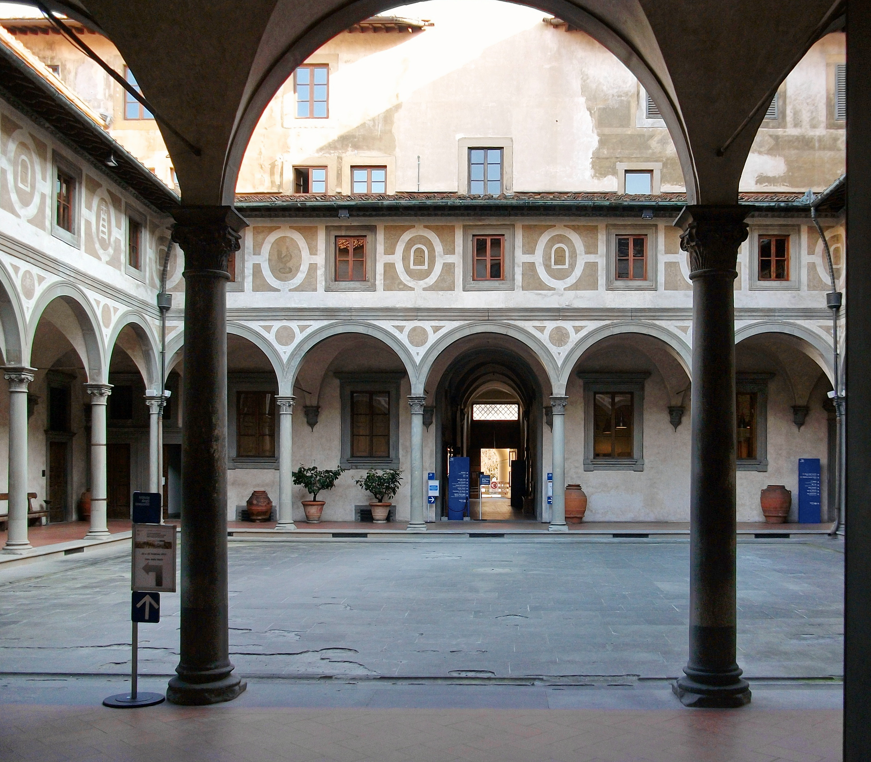 Claustre dels Homes de l'Hospital dels Innocents de Florència.